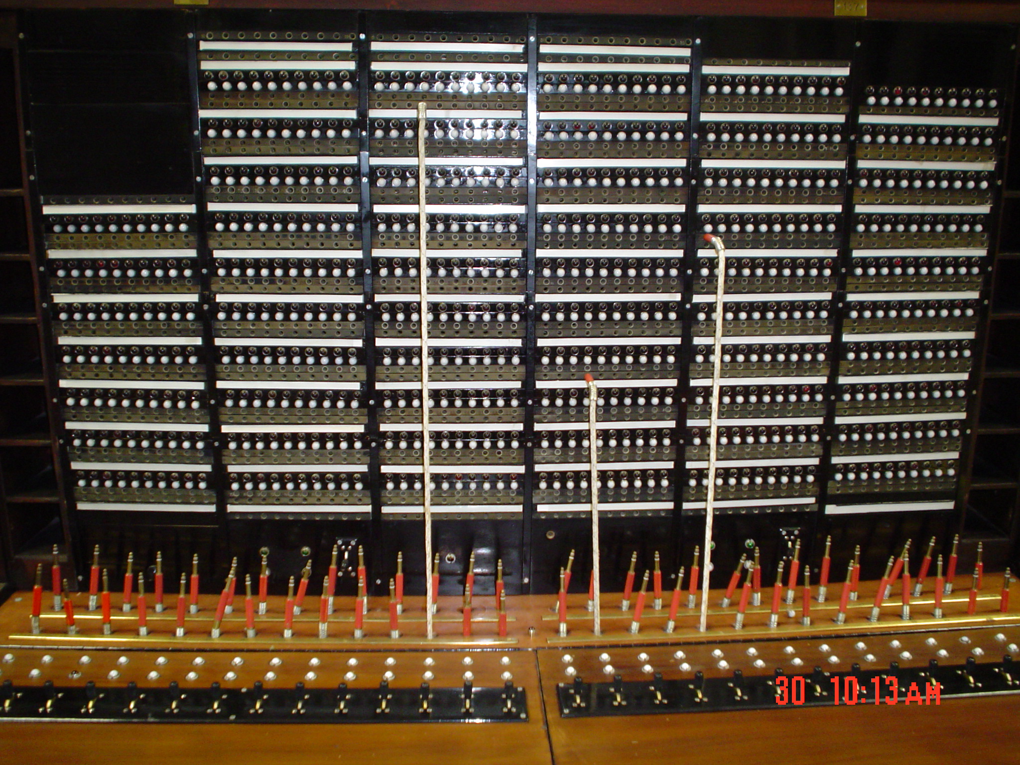 Kézi kapcsolású telefonközpont (Telefonmúzeum, Miskolc)